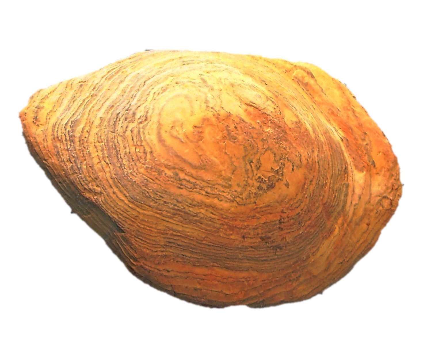 Lebacher Ei